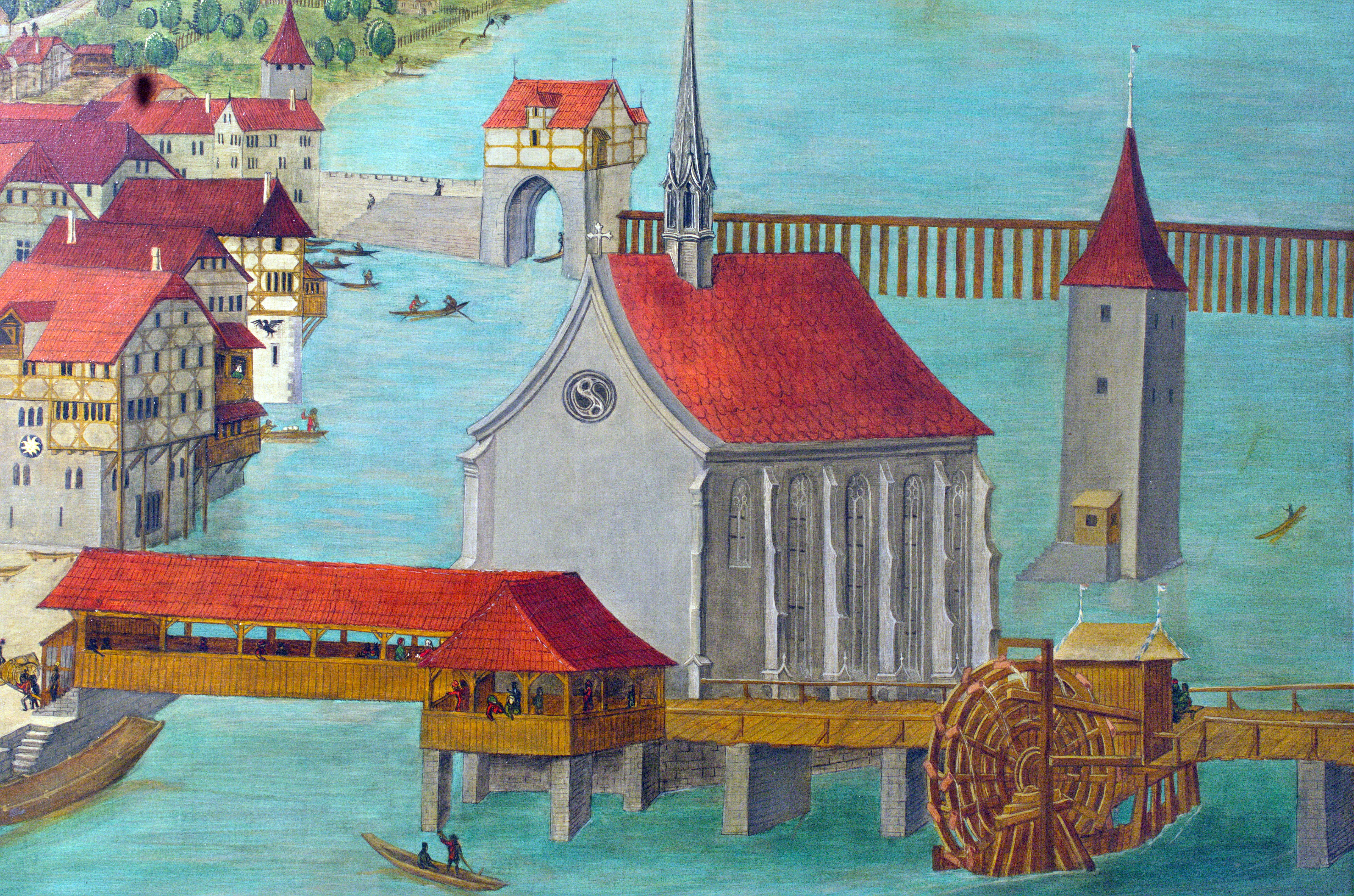 Die Wasserkirche ihre Wassermühle auf der Replik der Altartafeln von Hans Leu im Baugeschichtlichen Archiv der Stadt Zürich im Haus zum Rech. Die Panoramansicht des linksseitigen Limmatufers – 'Standort' der BetrachterIn ist wohl der Karlsturm des Grossmünsters – von Hans Leu d. Ä. gilt als die älteste zuverlässige Darstellung der Stadt Zürich, Ende des 15. Jahrhunderts auf den Altartafeln im Grossmünster mit viel Liebe zum Detail festgehalten. Die originalen Tafeln sind heute im Landesmuseum ausgestellt, eine (vermutlich) 1:1 Replik ist im Stadtarchiv öffentlich zugänglich.